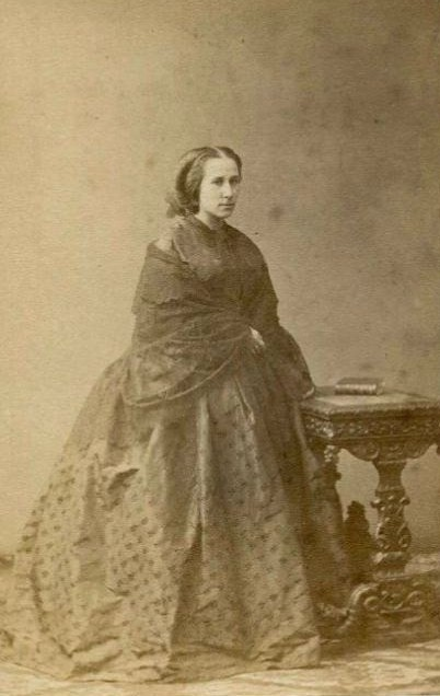 Княгиня Екатерина Николаевна Орлова (1840—1875)